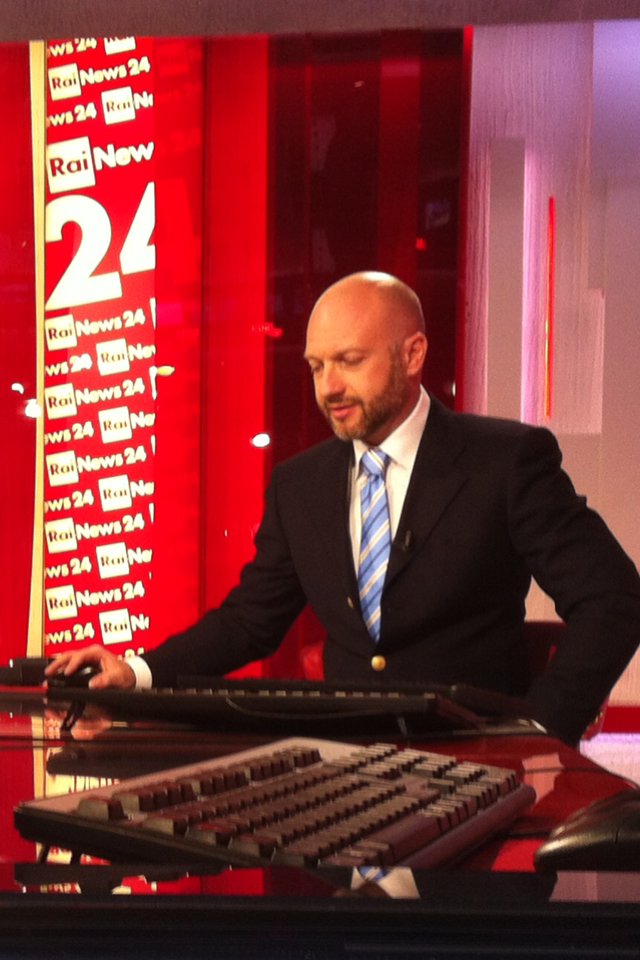 il giornalista di RaiNews24 Lorenzo di Las Plassas